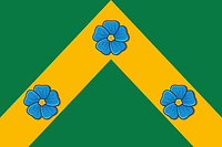 Утвержден Решением IV заседания IV созыва Совета Пудожского муниципального района от 21.12.2018 г. № 28